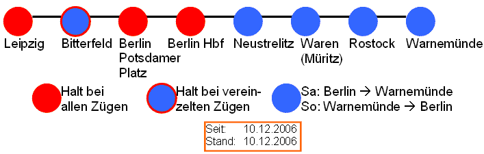 Author: BR 146 (Armin Emde) Describtion: Plan of the trainservice InterConnex 1 since December 10 2006 - Selfdrawn Autor: BR 146 (Armin Emde) Beschreibung: Netzplan der Zugverbindung InterConnex 1 seit dem 10. Dezember 2006- Selbstgezeichnet